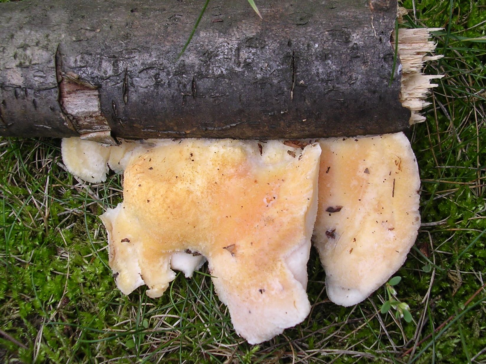 Piemontèis: Tyromyces kmetii